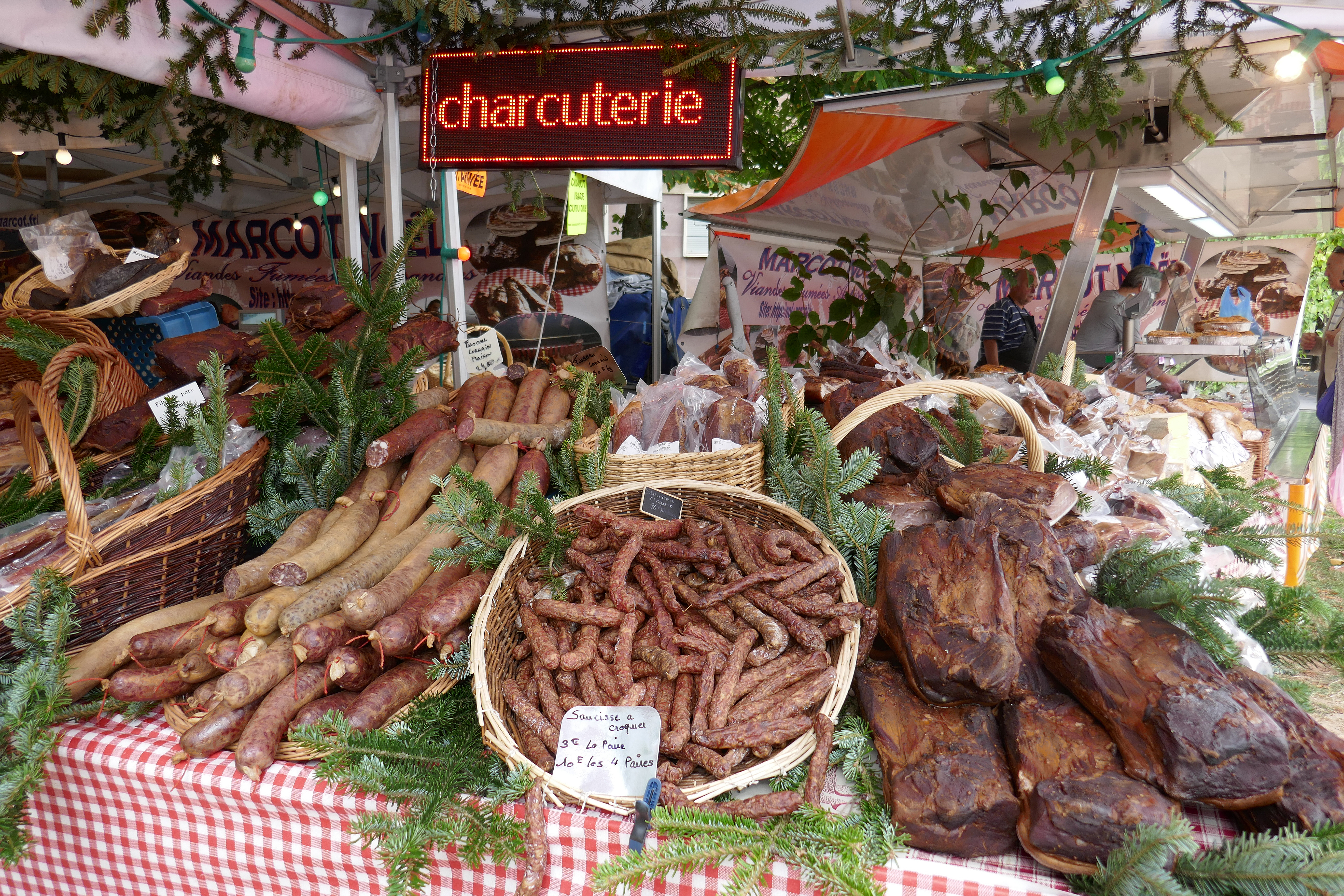 Charcuterie fumée des Vosges (Anould) au Salon de la Gastronomie dans le cadre du Festival international de géographie (FIG) de Saint-Dié-des-Vosges.